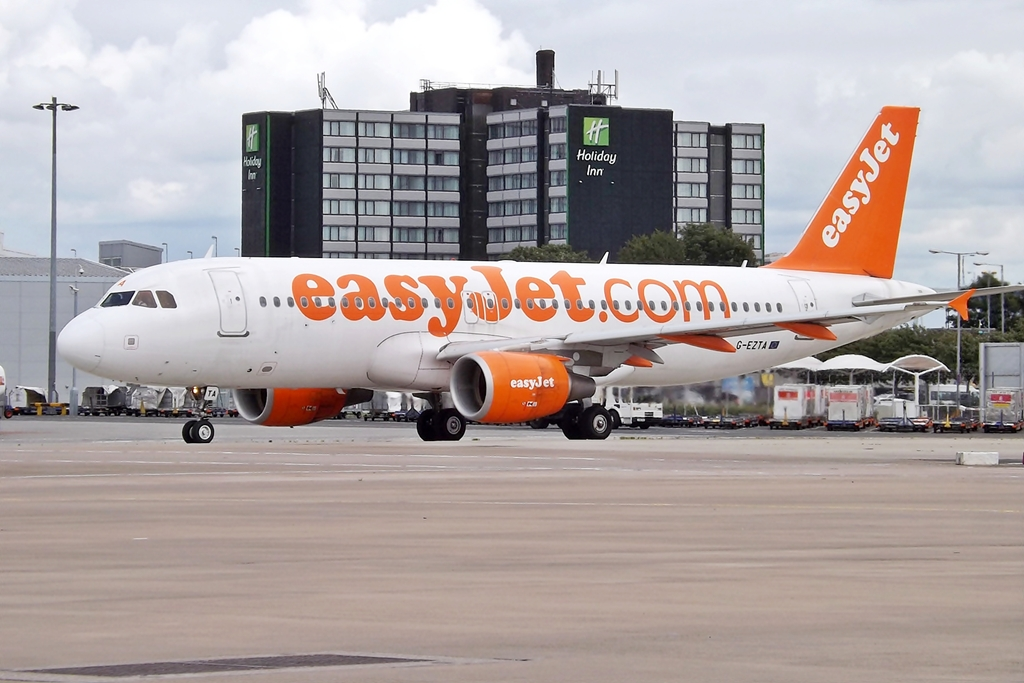 G-EZTA A320 Easyjet